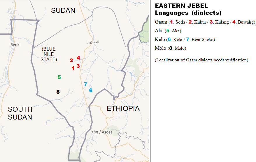 Map of the Eastern Jebel Languages